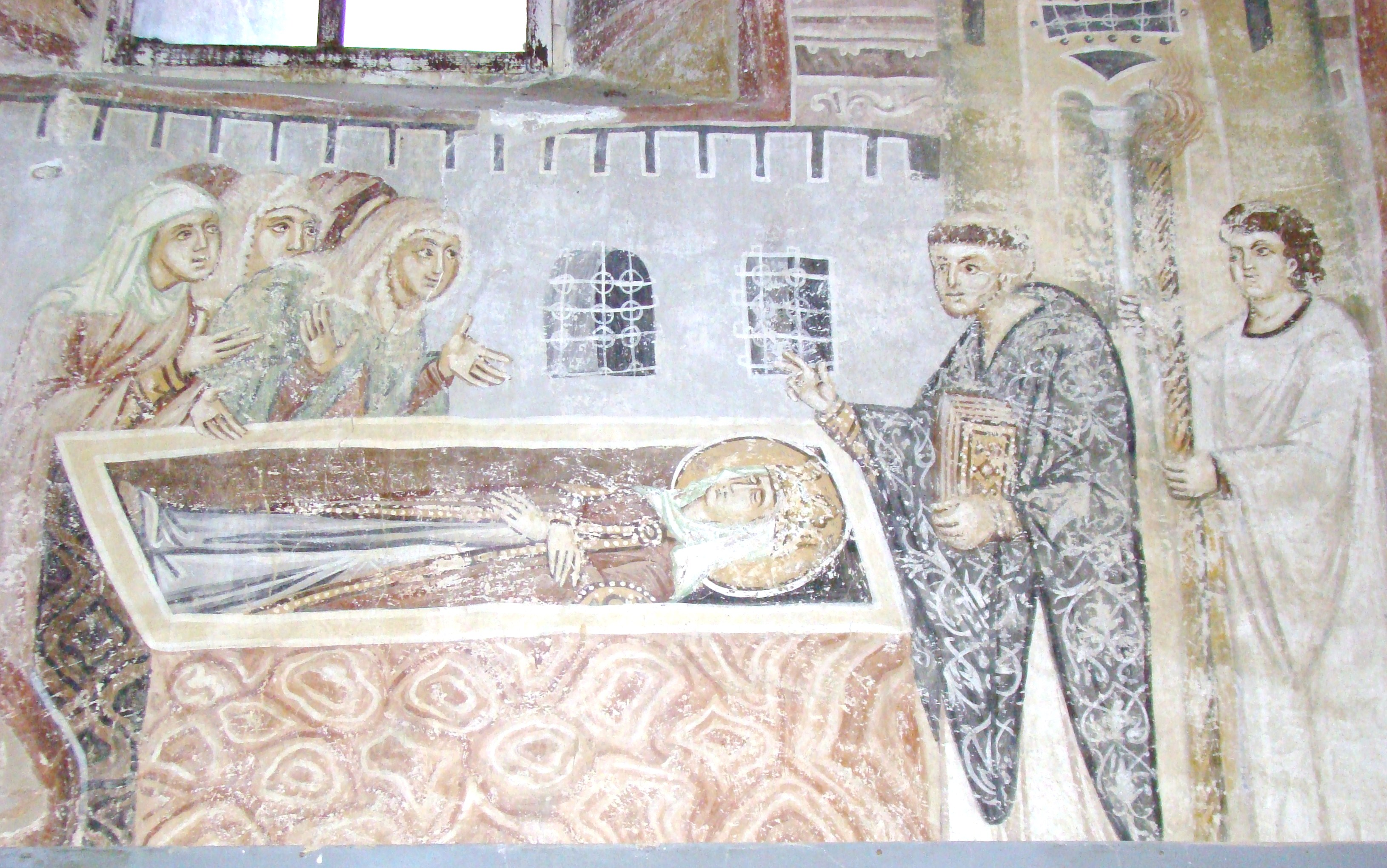 Biserica evanghelică, sat DÂRLOS; comuna DÂRLOS, județul Sibiu